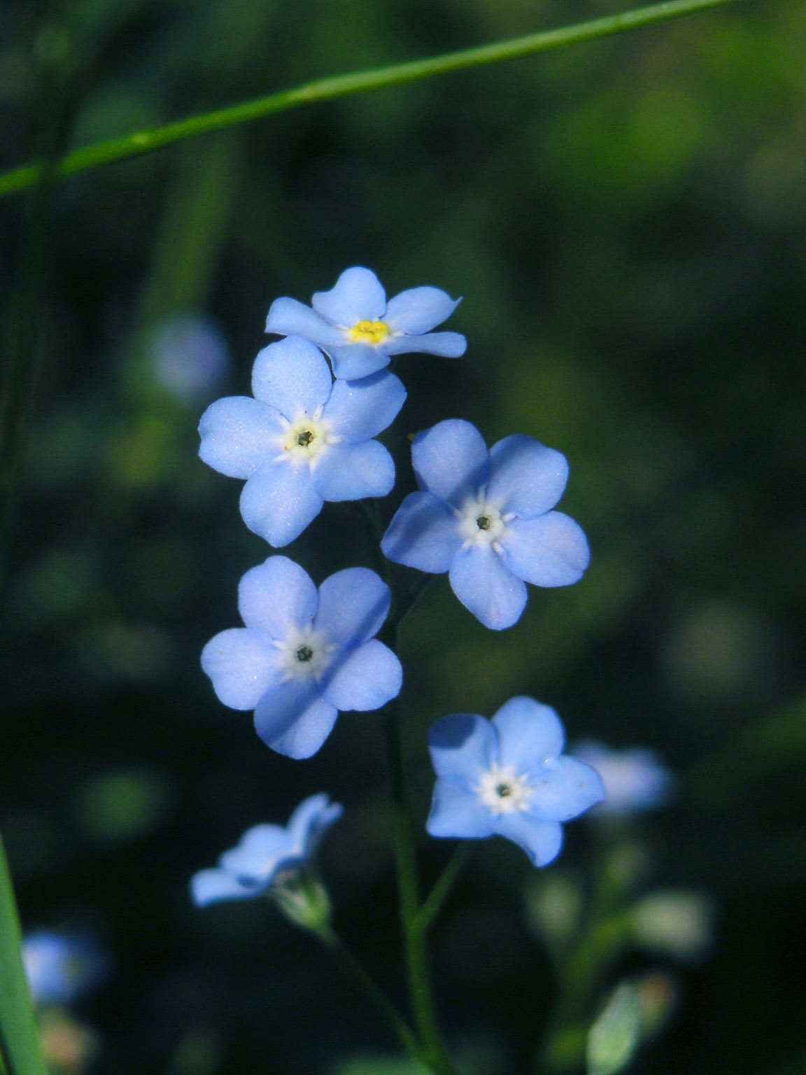 Vergissmeinnicht fotografiert im Südtirol (Melagalm)